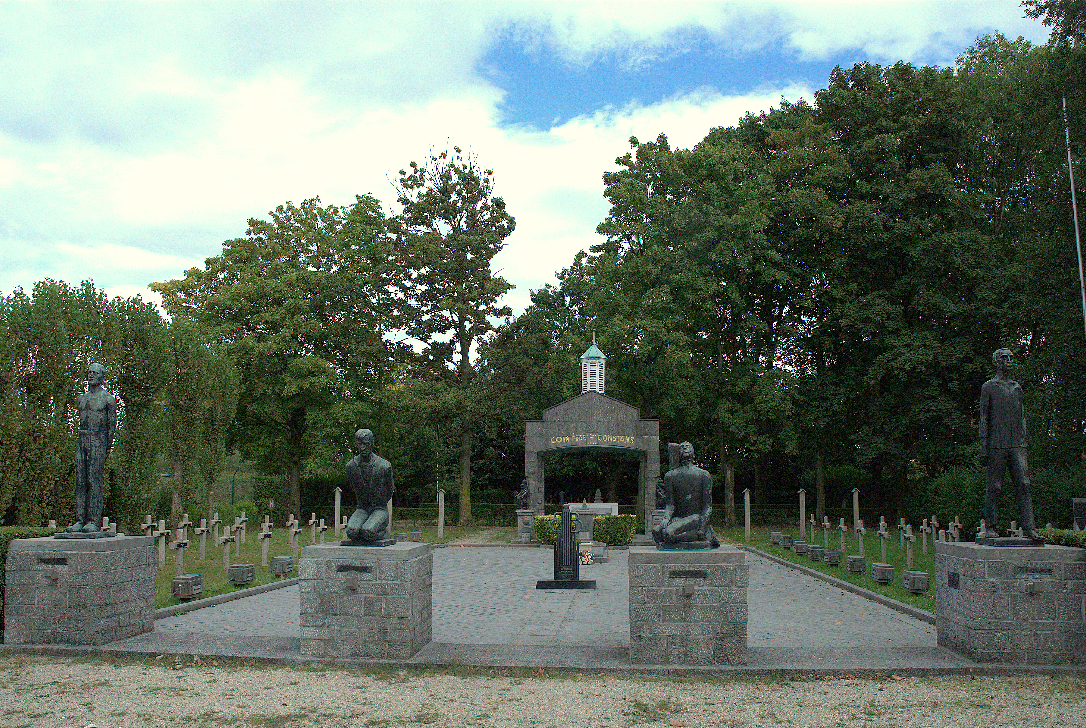 Executieoord Rieme-Oostakker te Oostakker (Gent), België. Bronzen beelden van Geo Vindevogel voorstellende De Gefusilleerde (1953), De Onthoofde (1954), de Gehangene (1955) en de Politieke Gevangene (1956).